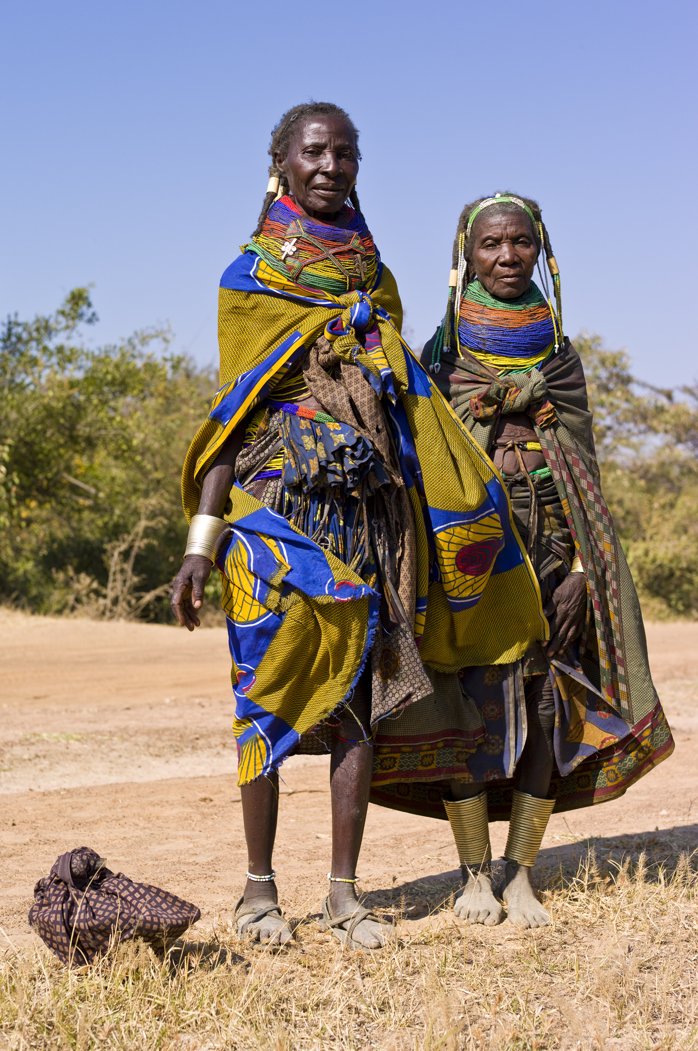 Muhuila women near ..., Angola